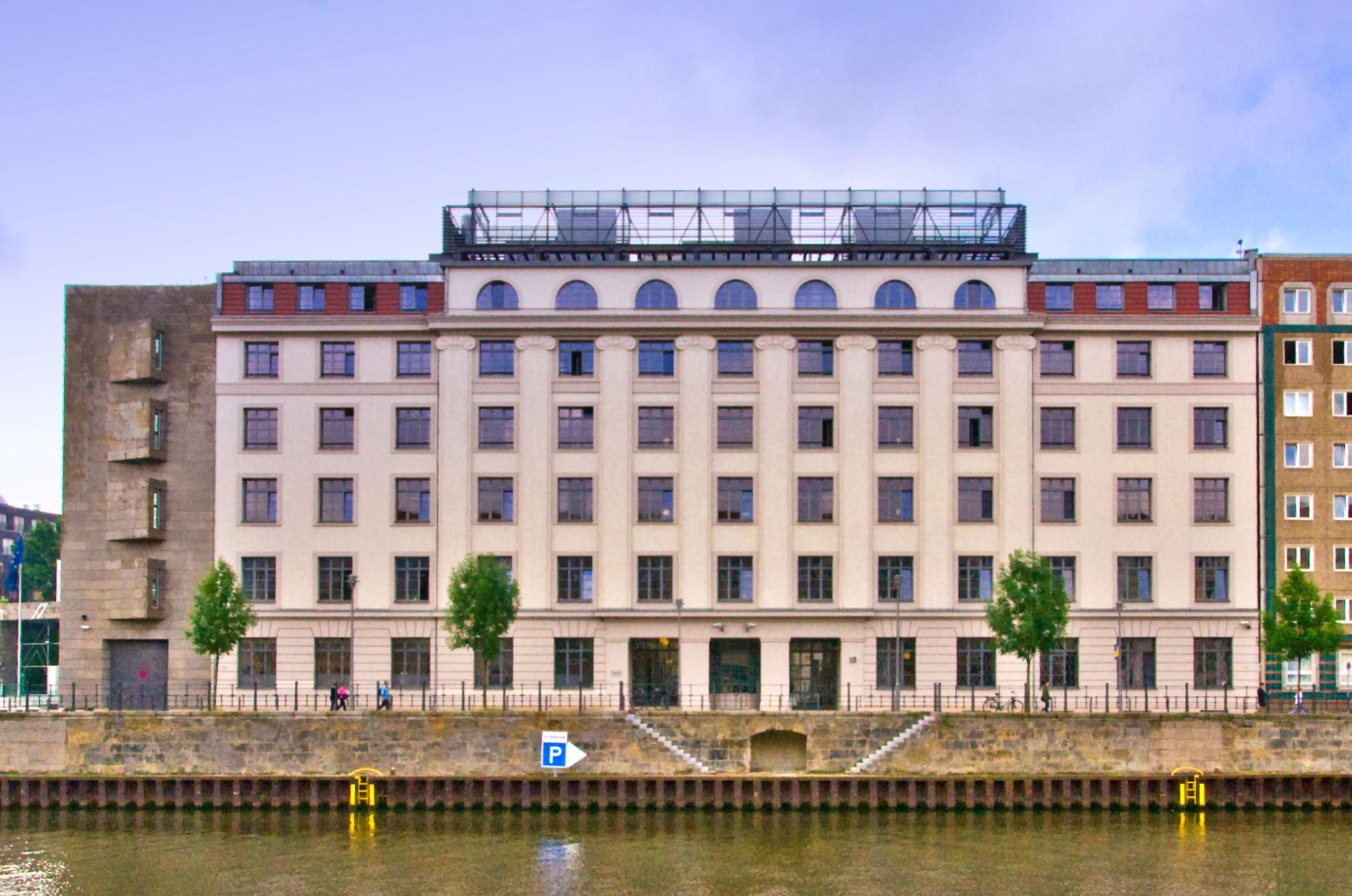 Berlin, Ansicht Fassade ehemaliges Postscheckamt am Reichstagufer